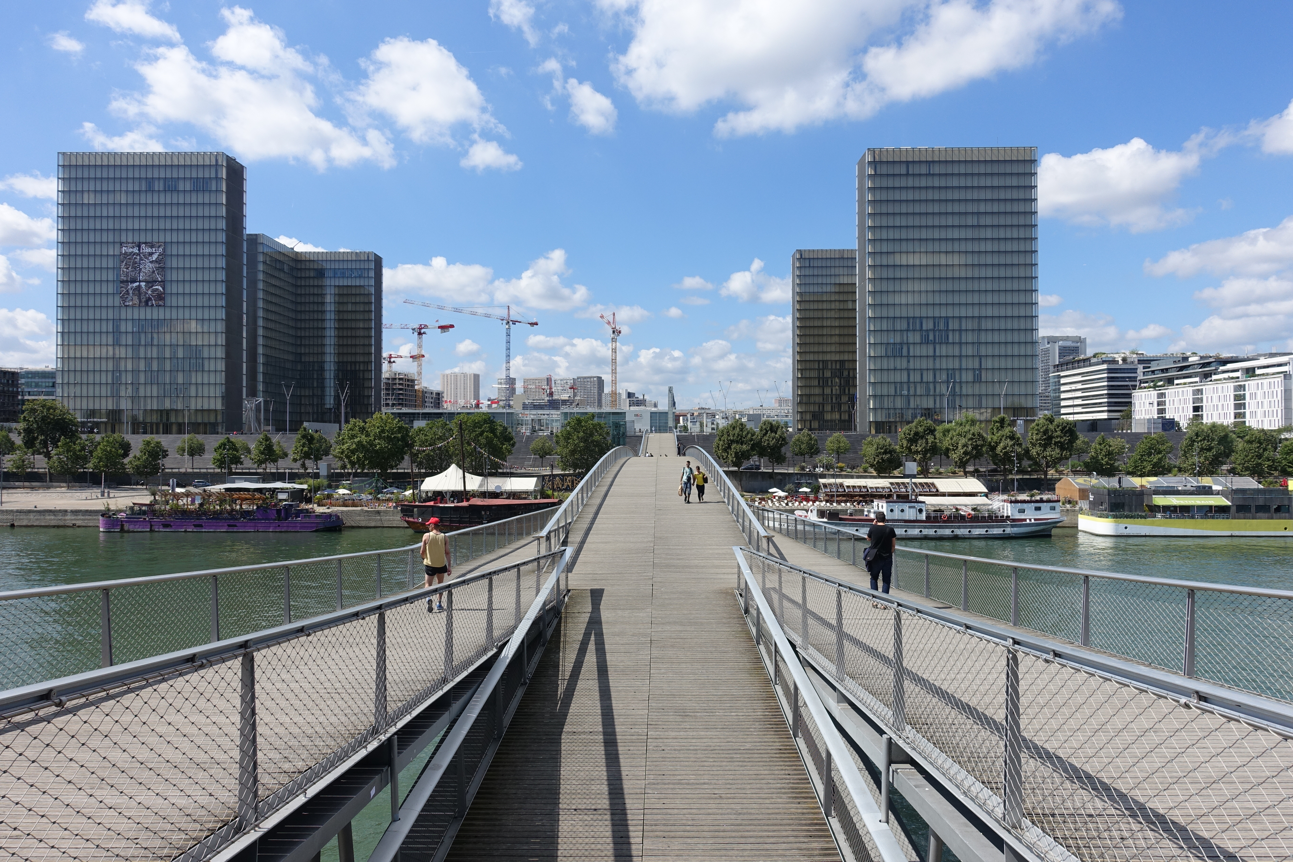 Passerelle Simone-de-Beauvoir @ Seine @ Paris